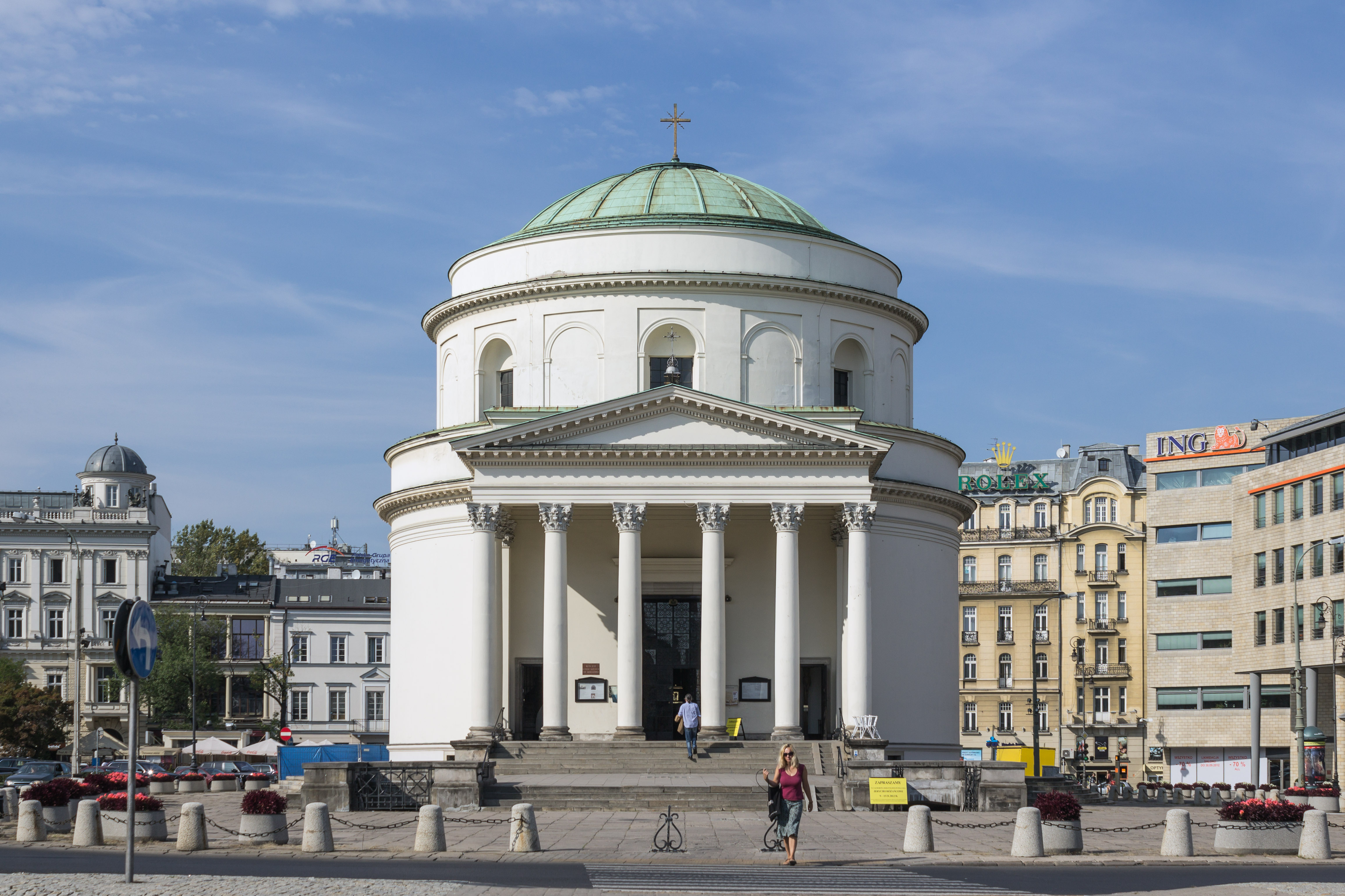 Kościół św. Aleksandra został wybudowany w latach 1818-1826. Architektem był Piotr Aigner. Mieści się on na placu Trzech Krzyży.